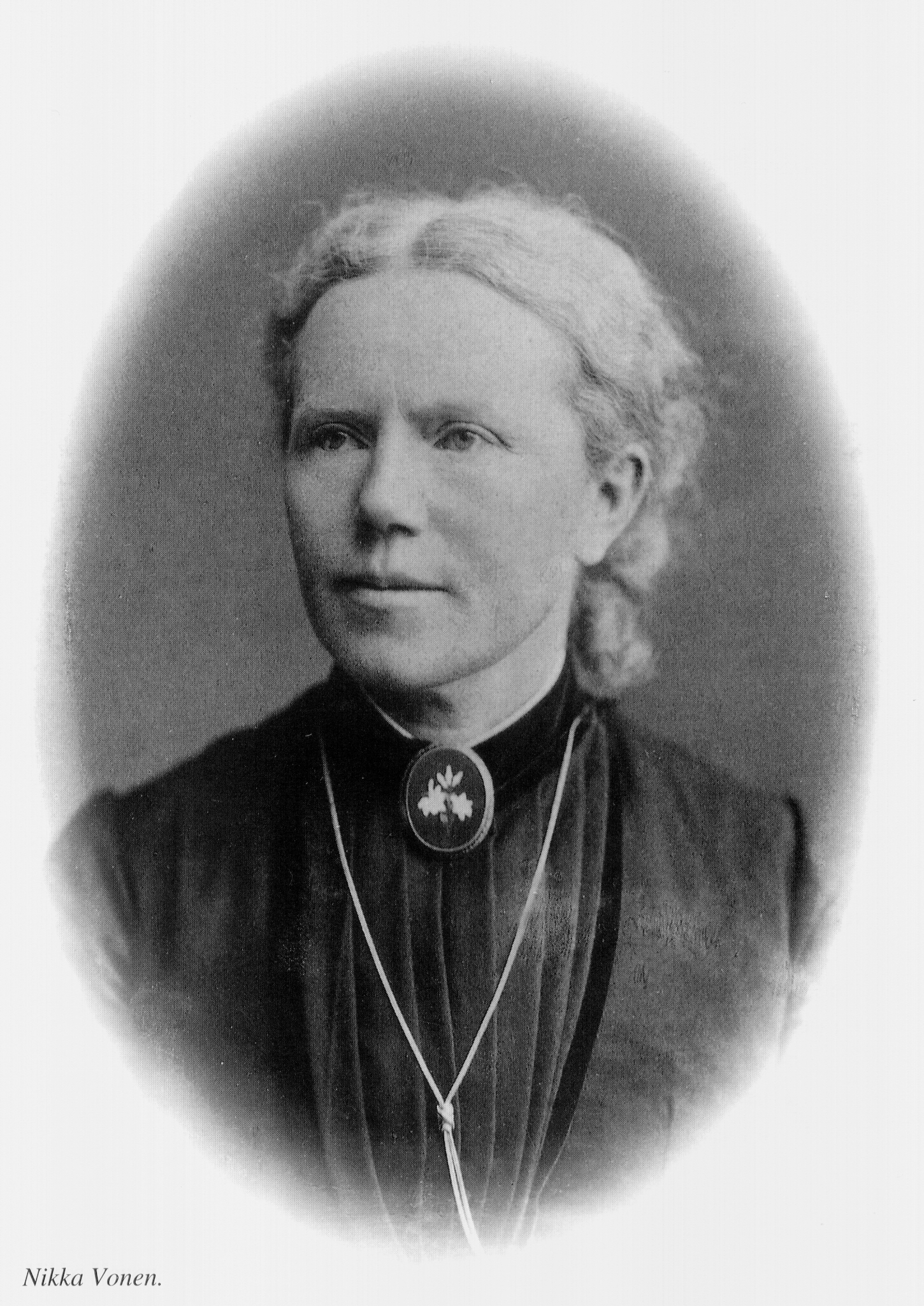 Nikka Vonen: målkvinne, fjellvandrar, forfattar, folkeminnesamlar og ikkje minst grunnleggar av og styrar på privatskulen Pigeinstitutet.